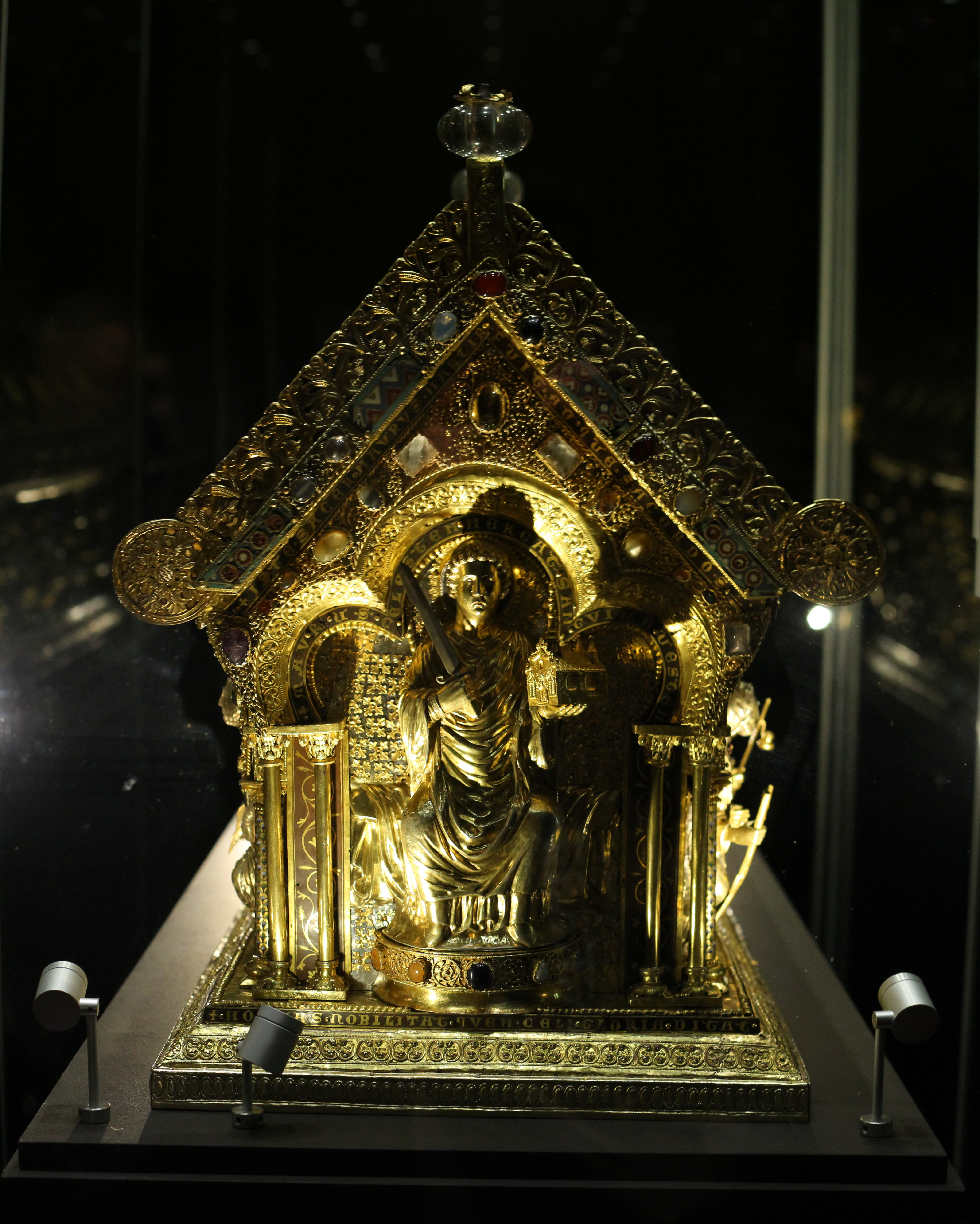 Relikviář svatého Maura, pohled na čelo se sv. Maurem Praha, Jízdárna Pražského hradu 2015